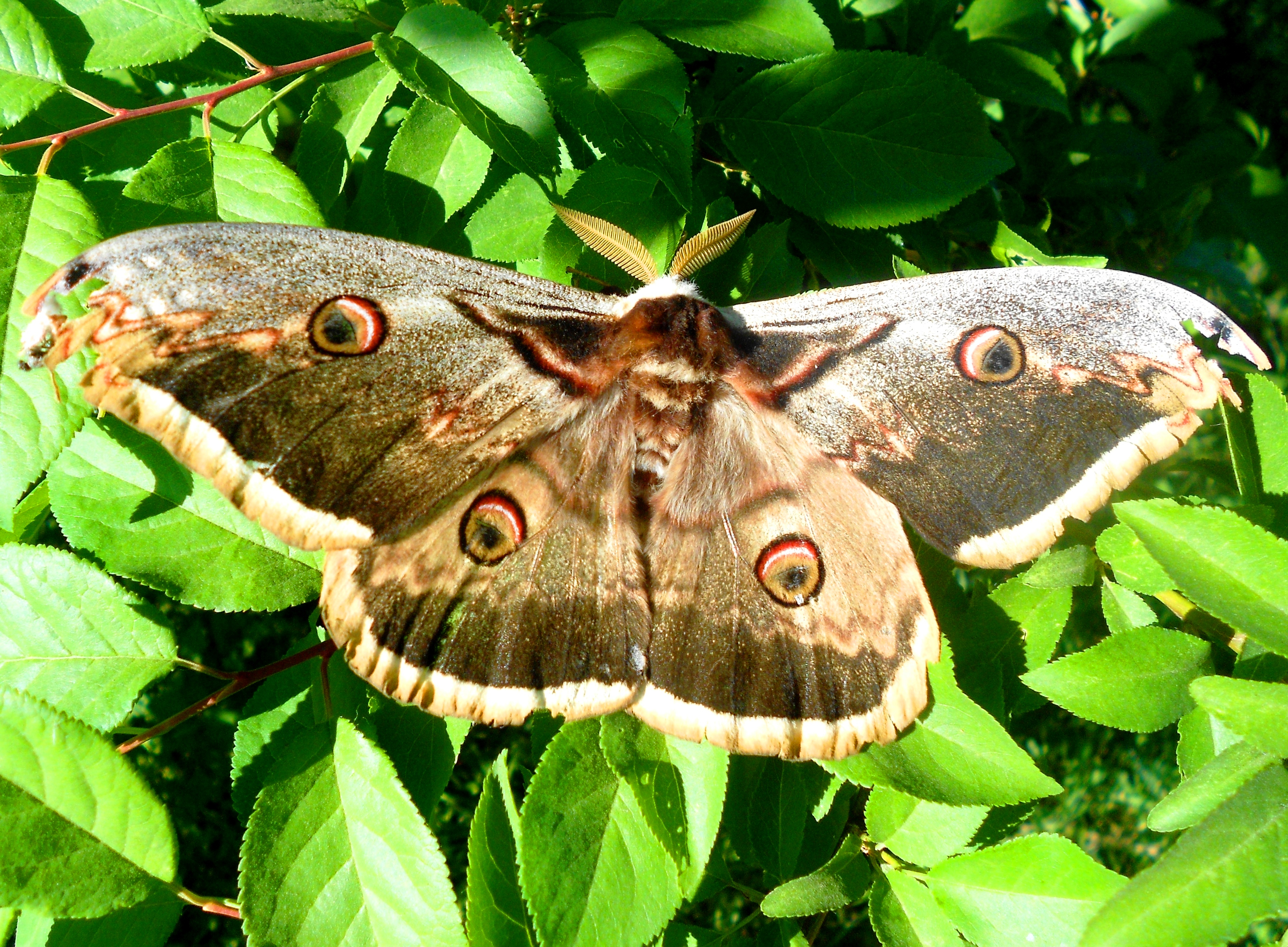 Fluturele ochi de păun mare (Saturnia pyri) în municipiul Bălți, Republica Moldova.